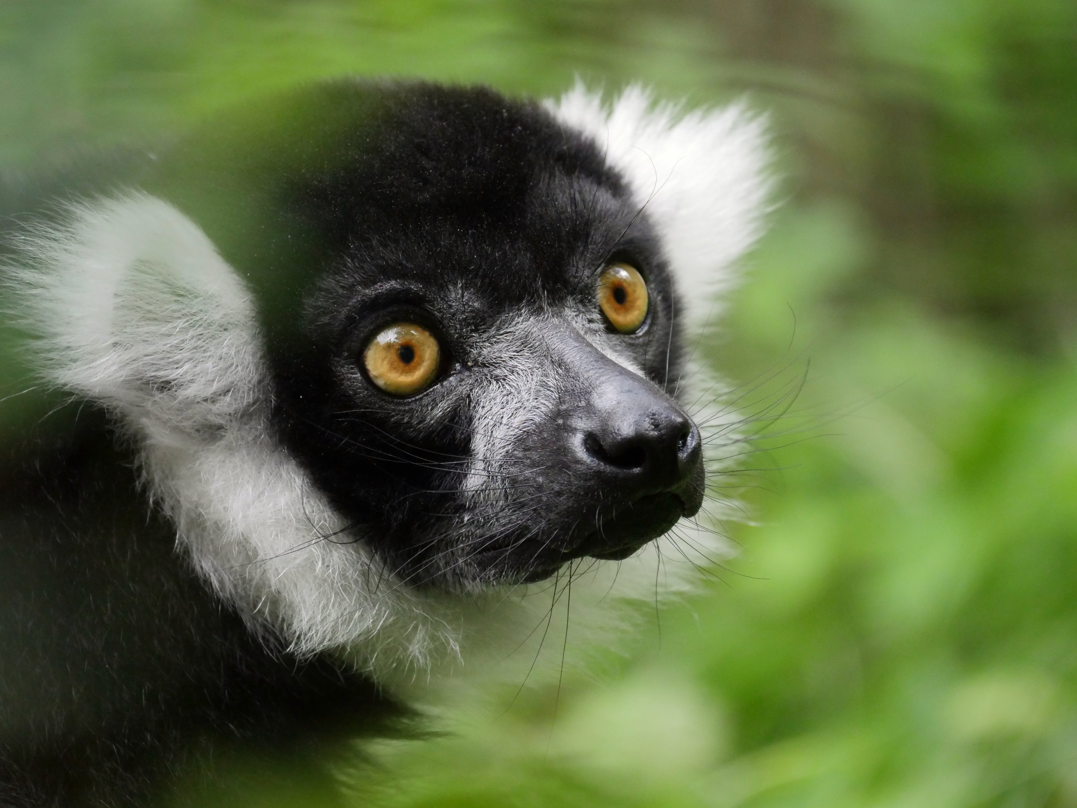 Daydream